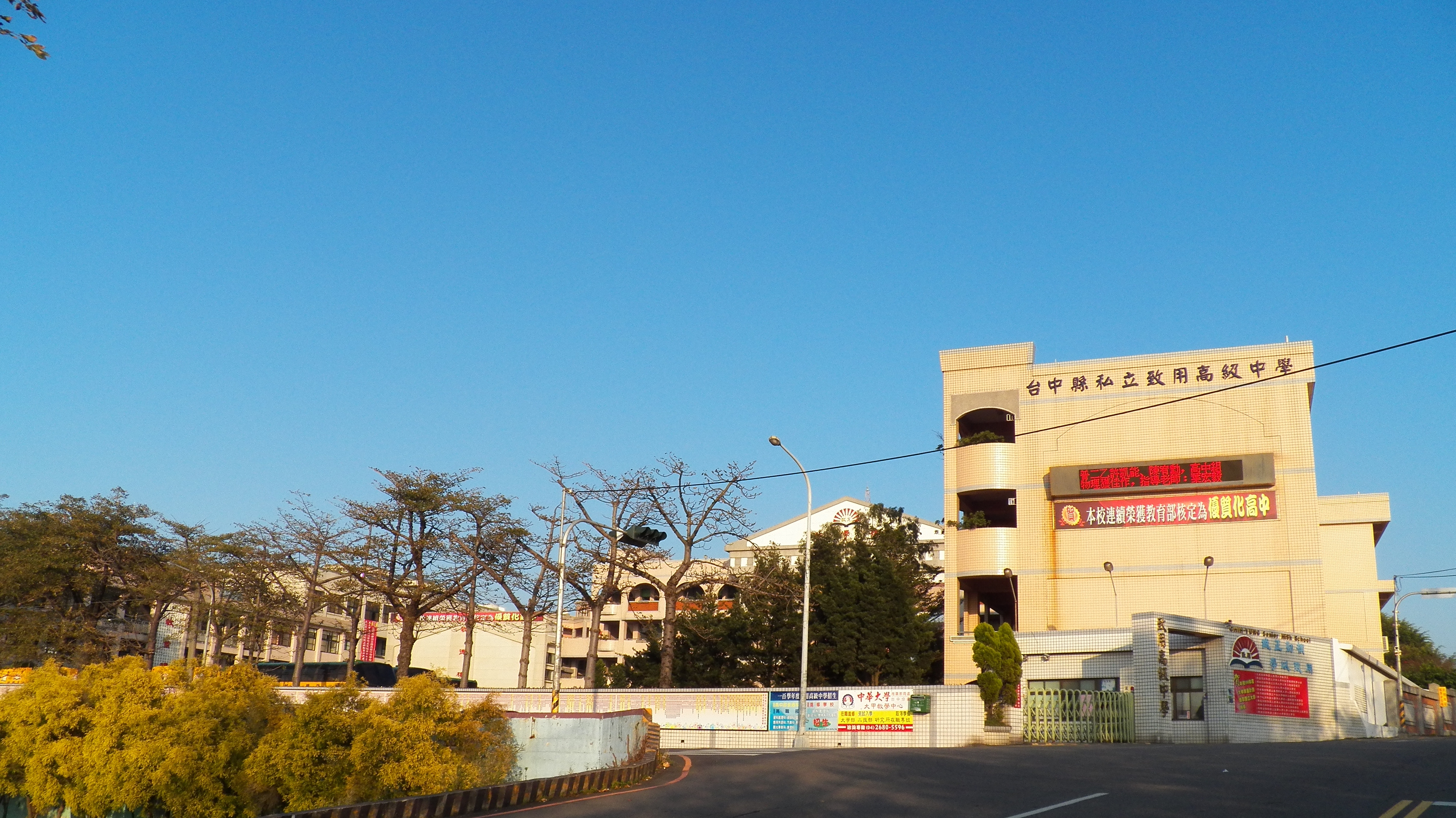 臺中市私立致用高中，地址：臺中市大甲區東陽新村71號。